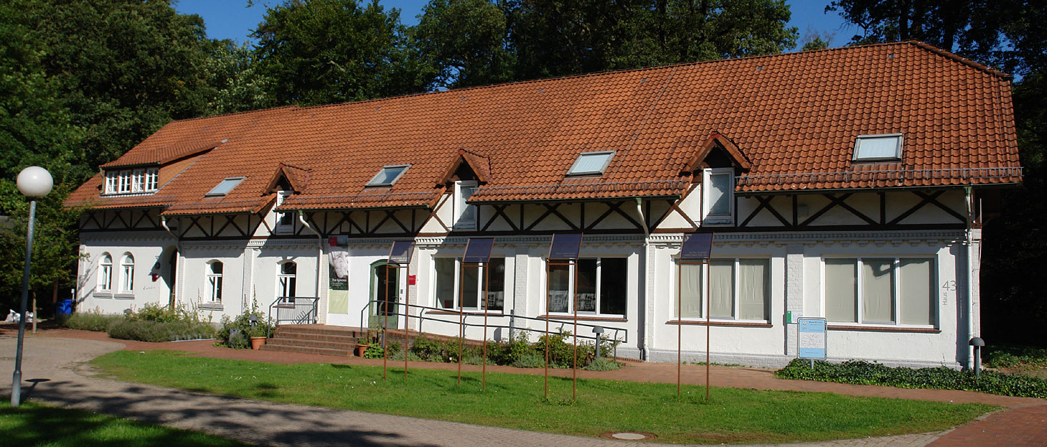 Klinikum Bremen-Ost, Haus 43. Ehemals St. Jürgen Asyl, Haus XXI. Herstellung ?? Funktion: Hofmeierhaus/Kuhstall. Heute Krankenhaus-Museum KulturAmbulanz Das abgebildete Objekt ist ein geschütztes Kulturdenkmal in der Freien Hansestadt Bremen, mit der Nr. 1674 beim Landesamt für Denkmalpflege registriert.